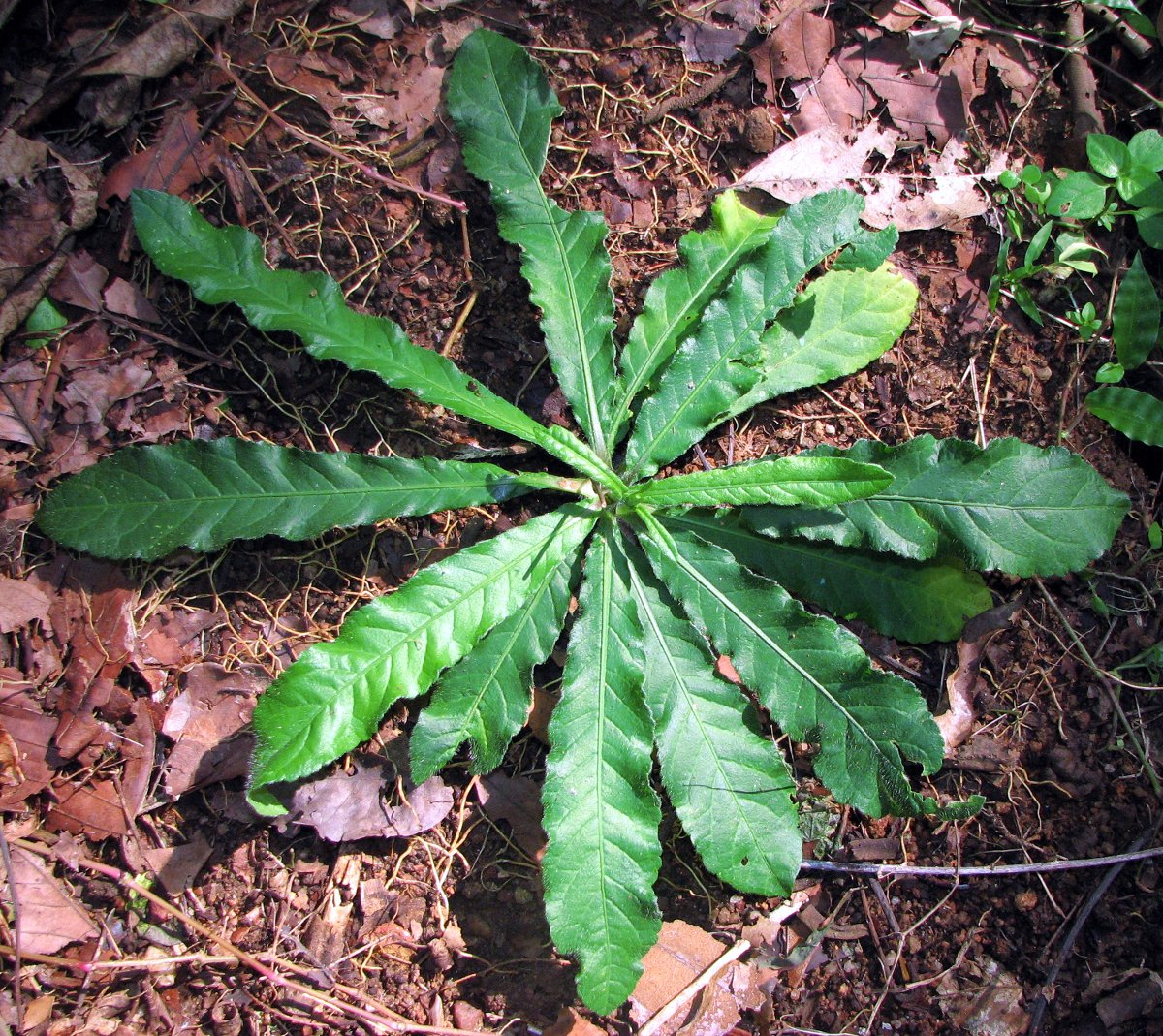 ആനച്ചുവടിയുടെ(prickly leaved elephants foot) ചിത്രം